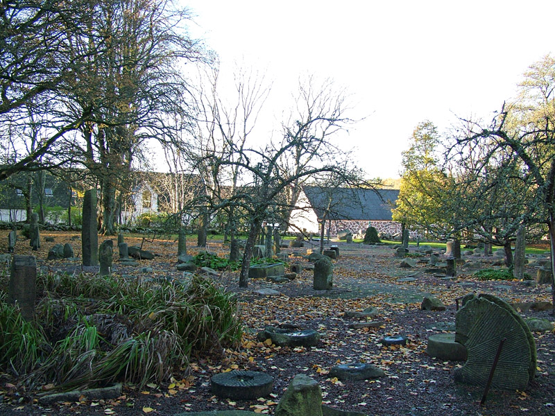 Boolsens stonegarden, Frederikshavn, Denmark Photo taken by Jørgen Larsen, 2004-10-27.